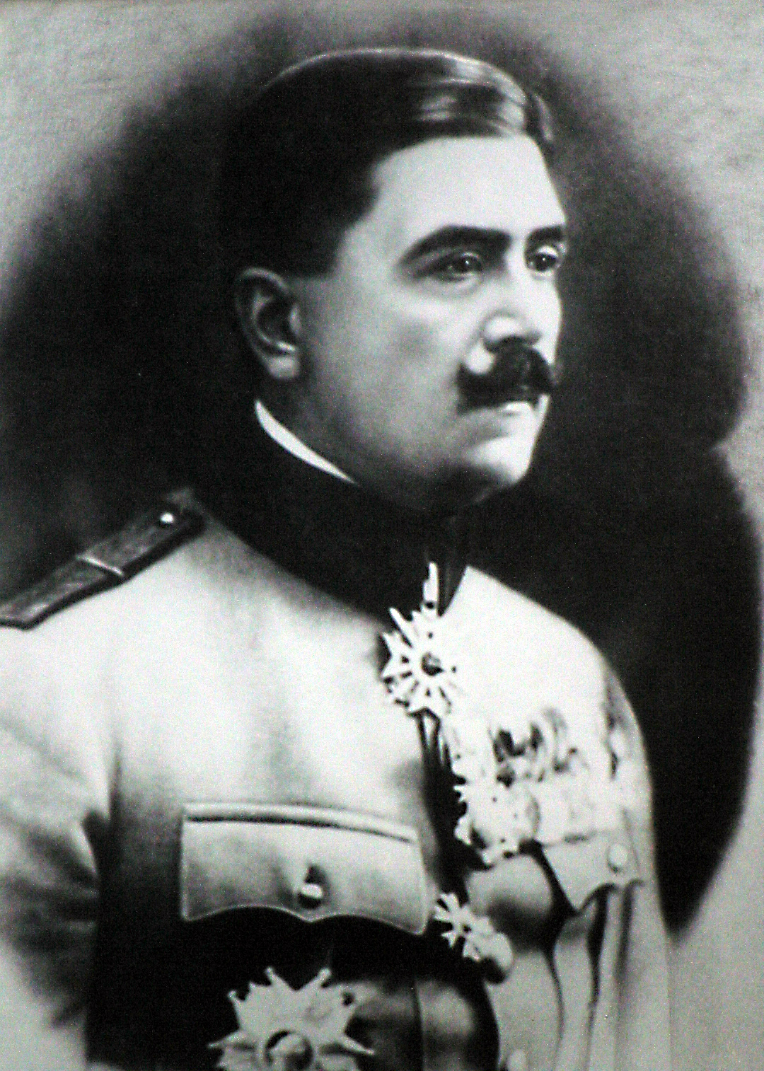 Generalul Ioan Rășcanu.